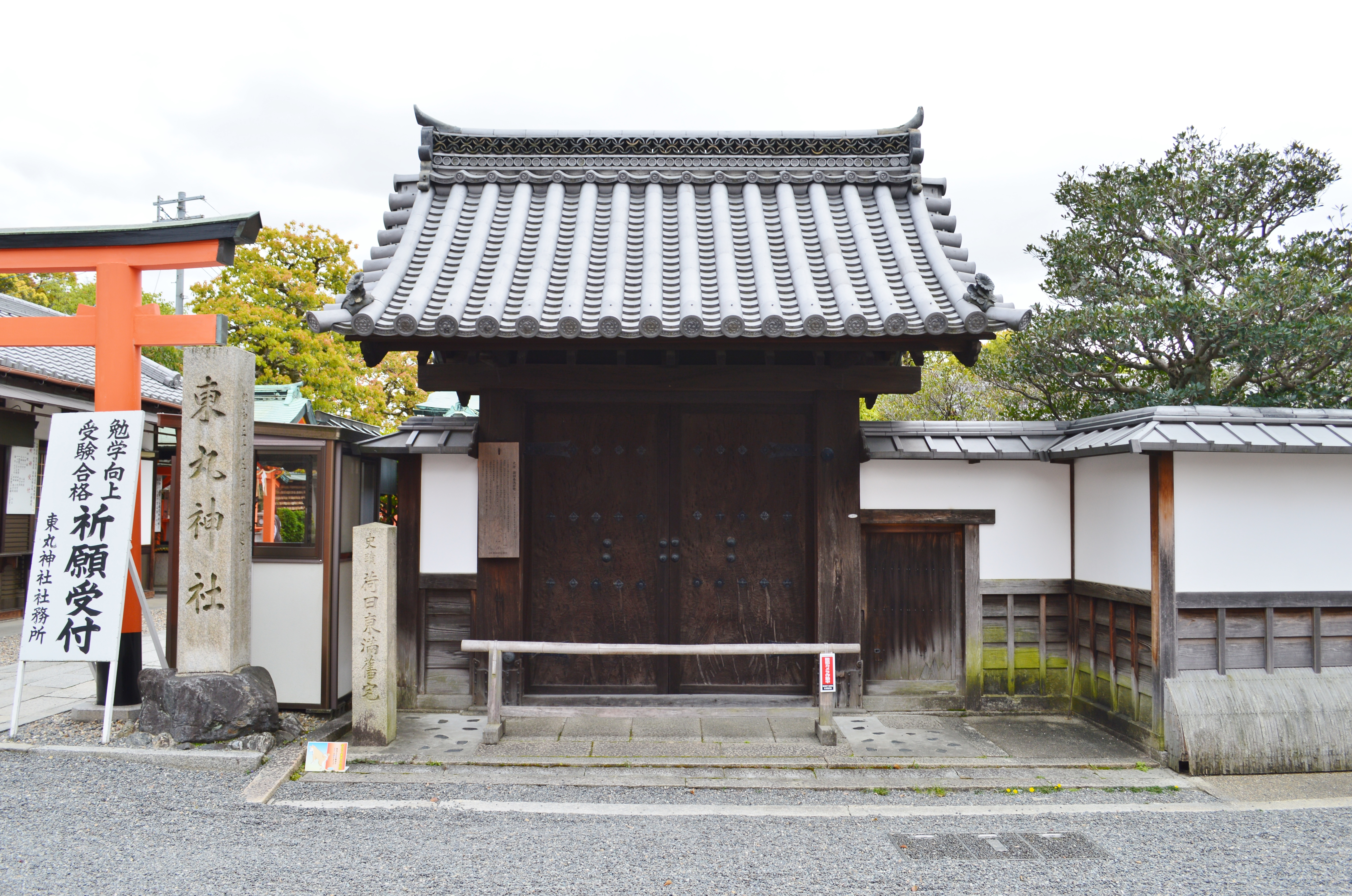 荷田春満旧宅 Nikon D3200